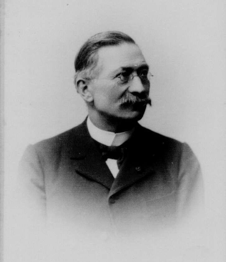 François Félix Crousse fotografita de Henry Dufey en Nancio